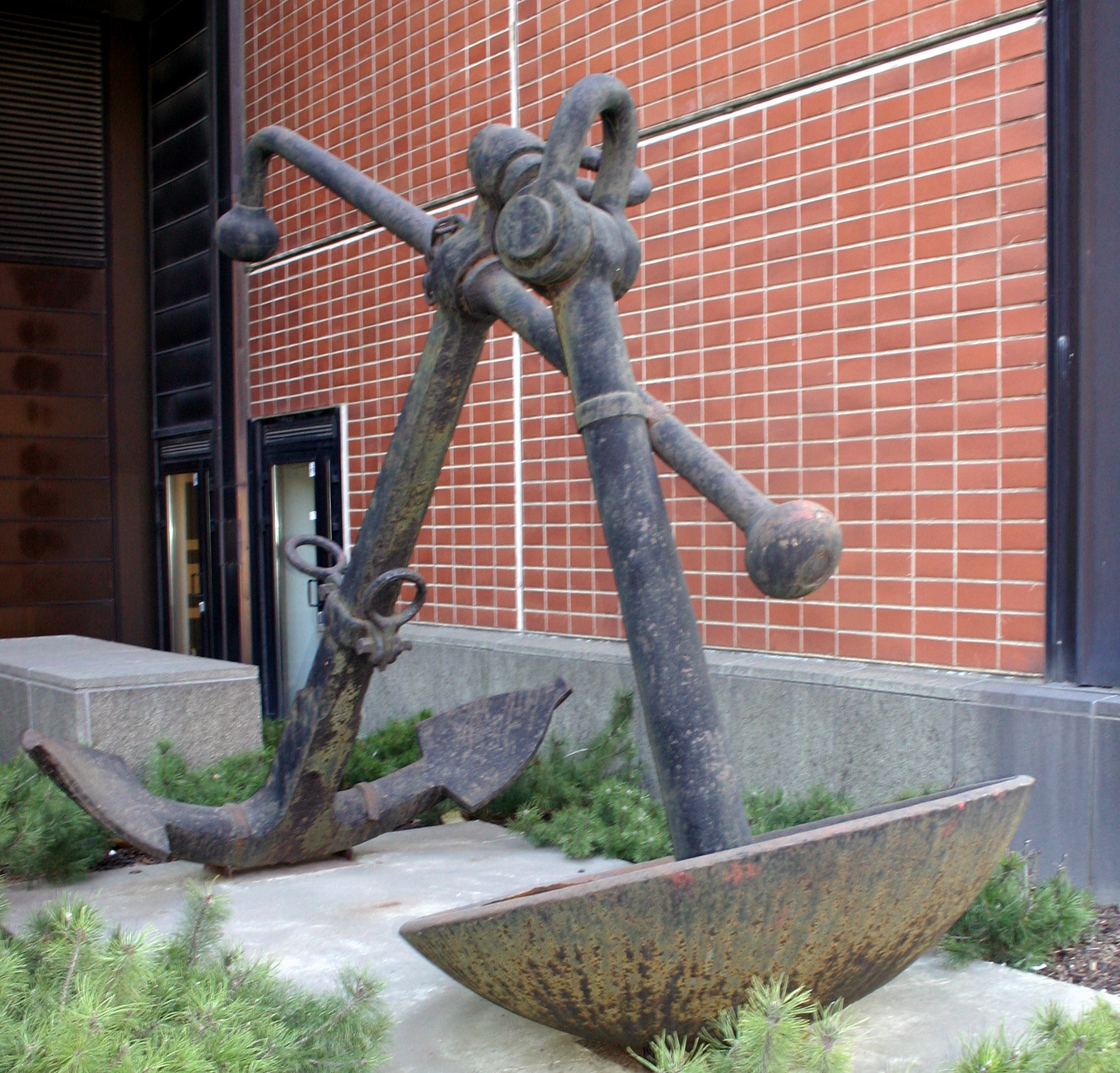 Majakkalaiva Storbrottenin keula-ankkurit Merenkulkulaitoksen talon edessä.